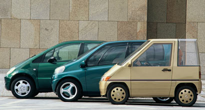 Bildbeschreibung: Mercedes-Benz Serienfahrzeug "A-Klasse" sowie Konzeptfahrzeuge "Studie A 93" und "NAFA" Quelle: Mediaseite der DaimlerChryslerAG Genehmigung: Gern können Sie für Ihre Tätigkeit für die Wikipedia Inhalte der DaimlerChrysler Medienseiten verwenden. Dazu erkennen wir die Bedingungen nach GNU-FDL an. Das Angebot bezieht sich auch auf die vorhandenen Bilder. (Dr. Josef Ernst, Communications, DaimlerChrysler AG)